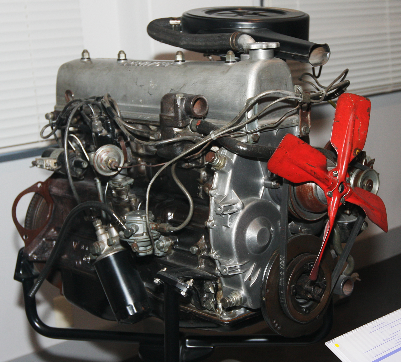 1963 Prince G7 engine. L6 1,988cc